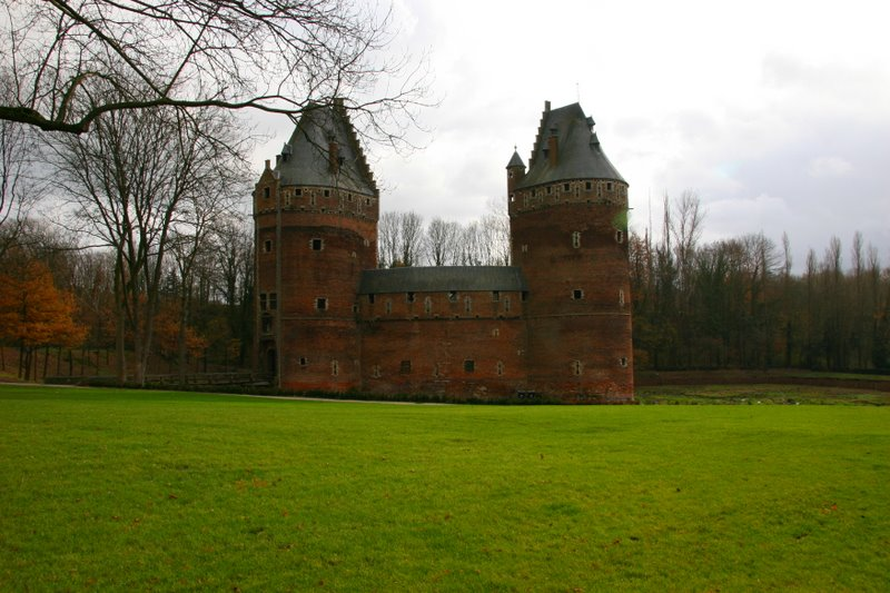 A beerseli kastély északi oldala, Belgium